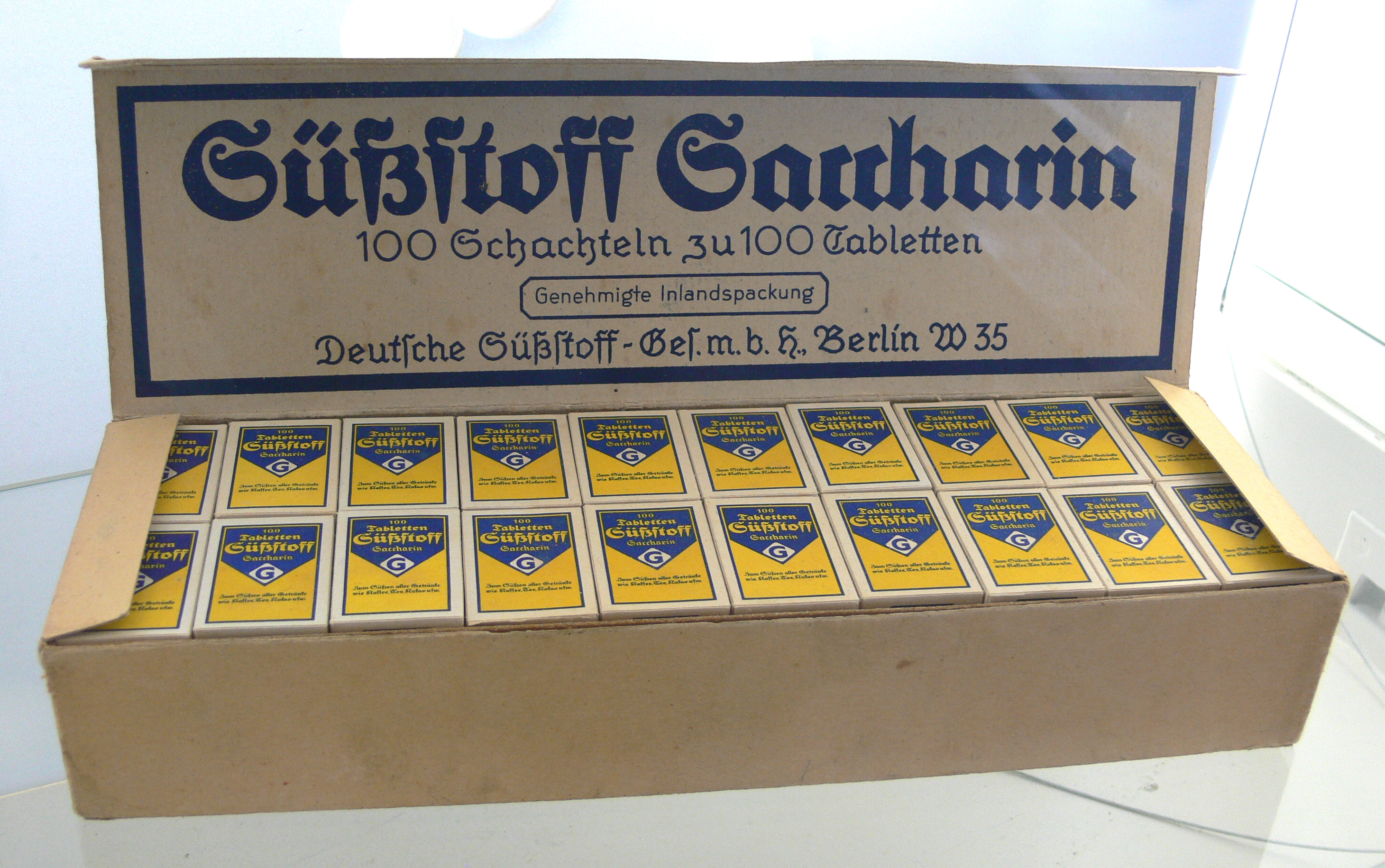 Süßstoff Saccharin, historische Verpackung; Zucker-Museum Berlin